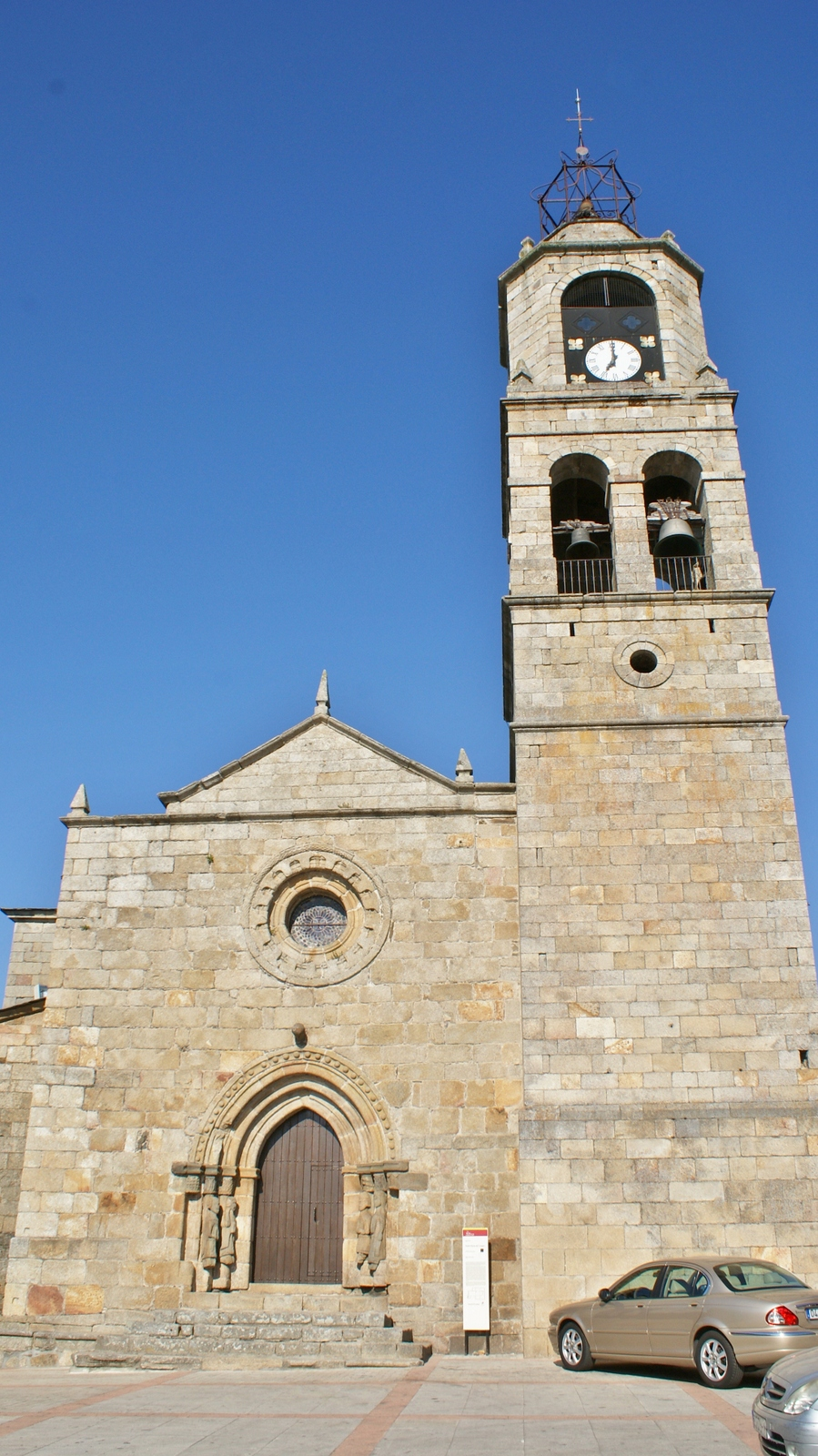 Iglesia de Nuestra Señora del Azogue, construida en el siglo XII, de estilo románico, aunque con importantes transformaciones posteriores en los siglos XVI, XVII y XVIII. Enmarcada dentro del Conjunto Histórico de Puebla de Sanabria. Zamora, Castilla y León